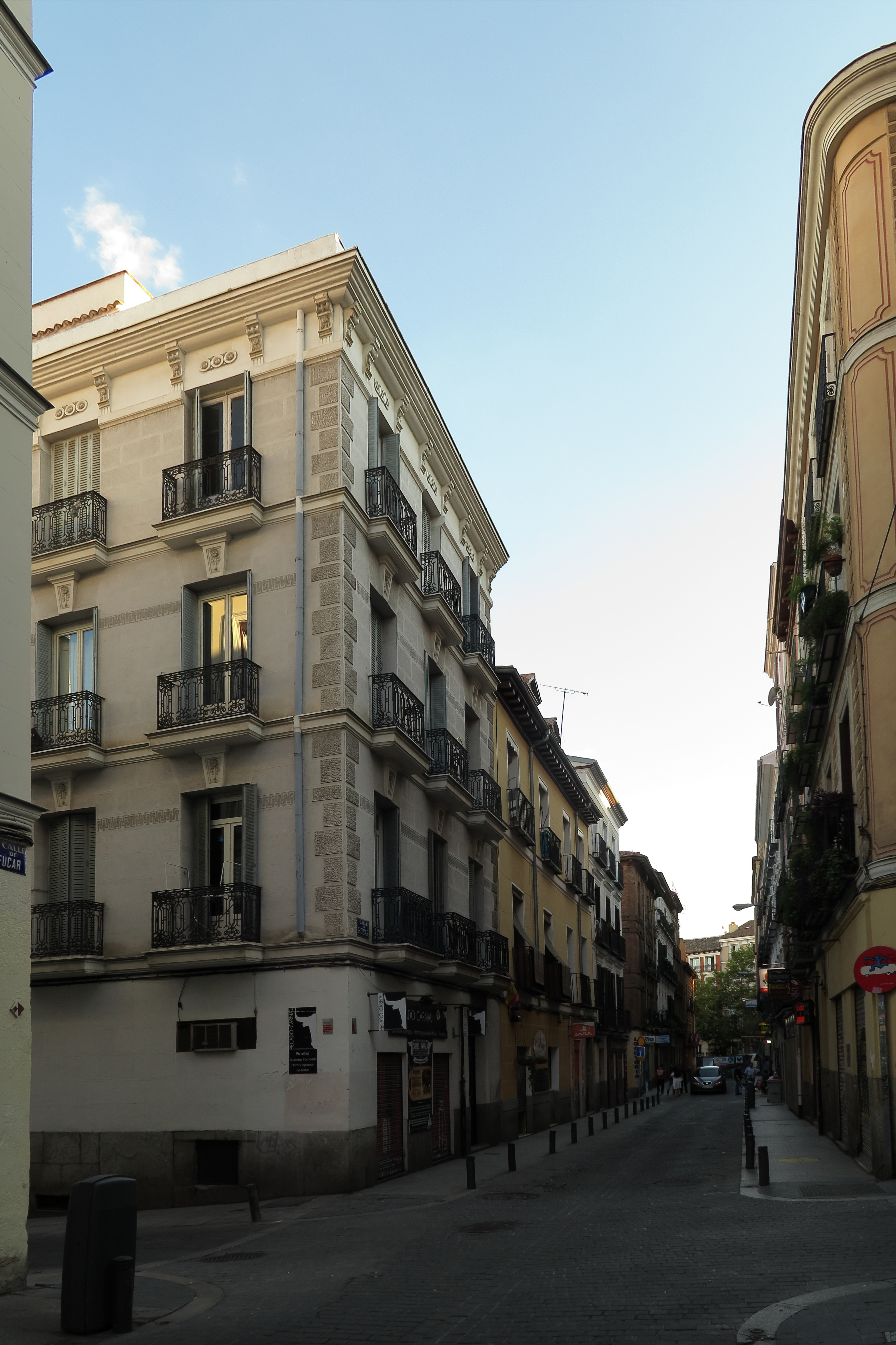 Calle Fucar